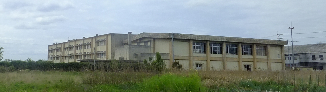 境港市立第二中学校